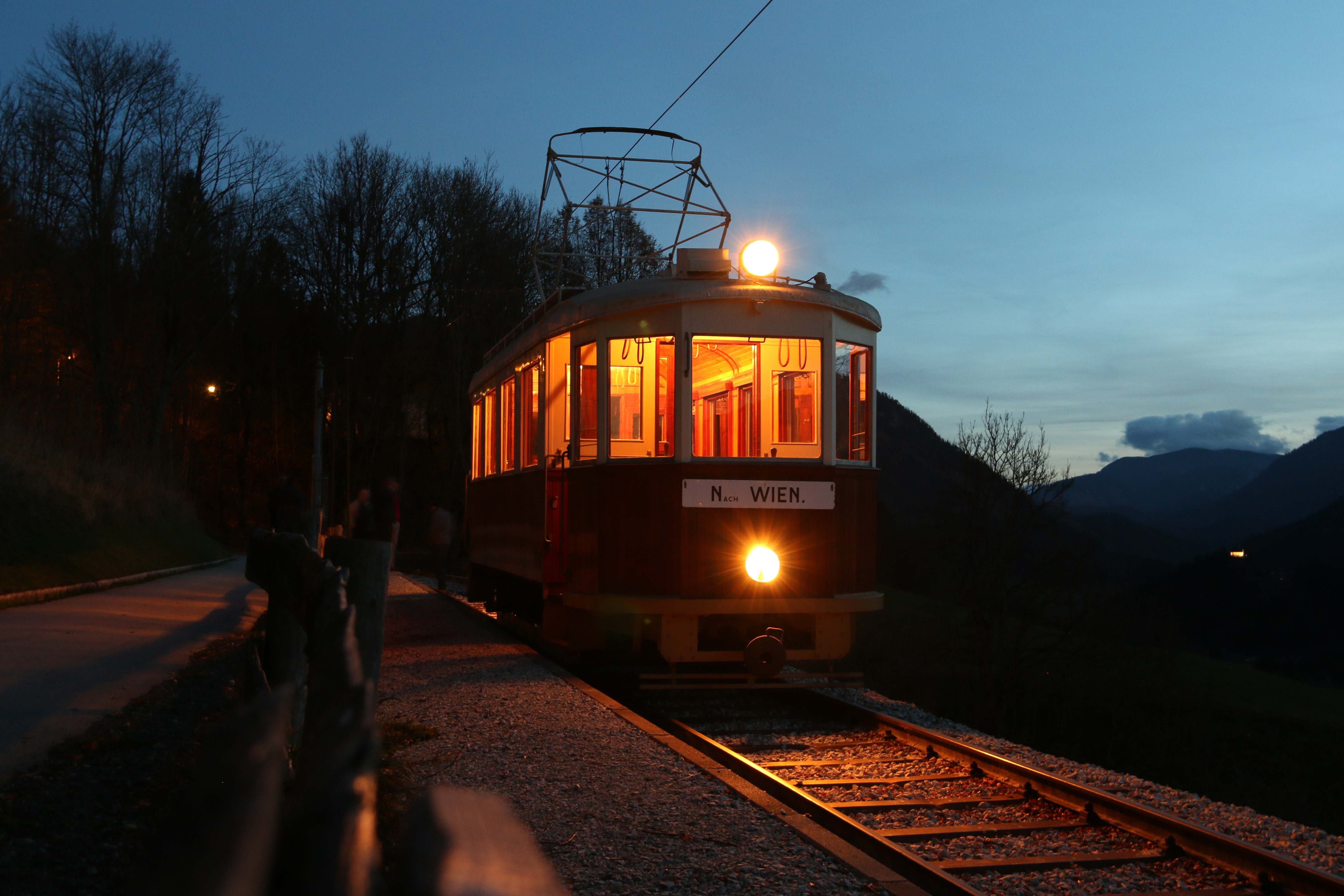 Anlässlich einer Probefahrt erreichte der ehemalig Preßburger Triebwagen CMg 1607 (Bj. 1912) am 9.11.2014 die zukünftige Endstation beim Promenadenweg.